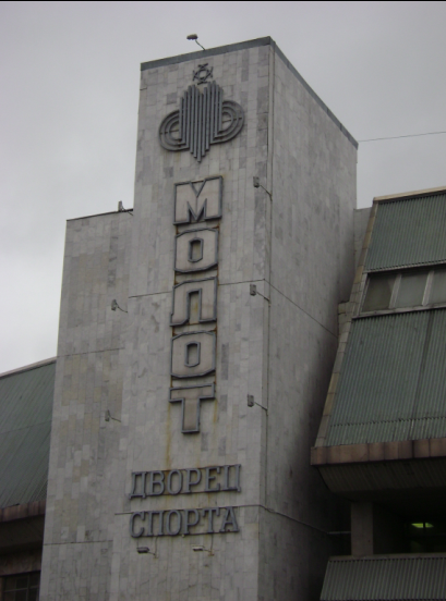 УДС «Молот», г. Пермь